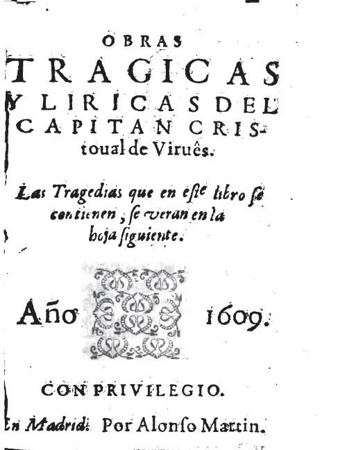 Obras trágicas y liricas edicion 1608 Cristóbal de Virués